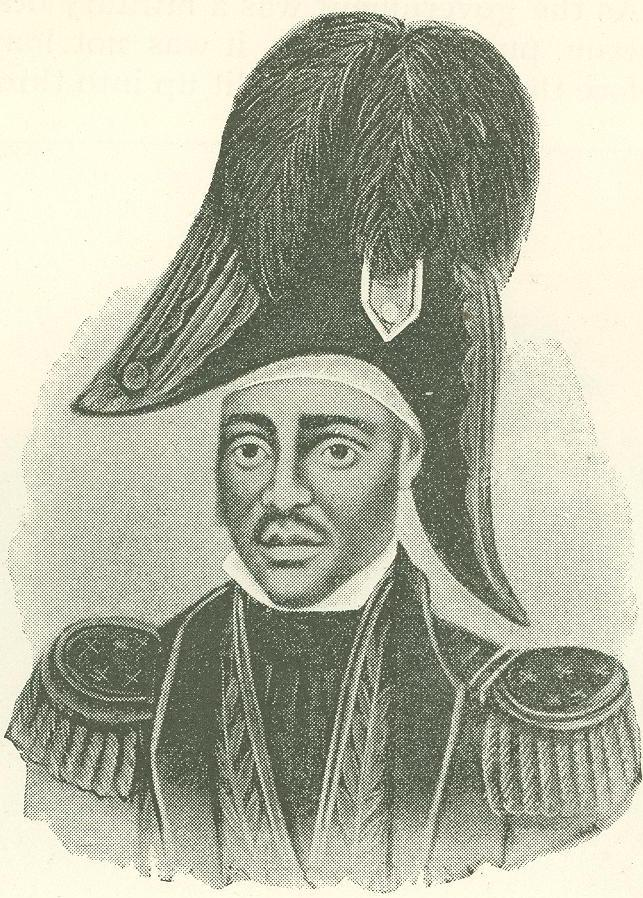 Kreyòl ayisyen : Jan Jak Desalin. Liberatè ak premye Anperè peyi Ayiti sou non Jak Premye.